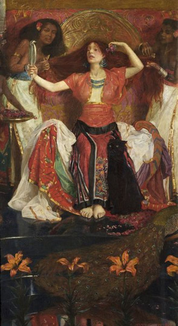 Jezebel. Museum: Russell-Cotes Art Gallery and Museum, Bournemouth, UK